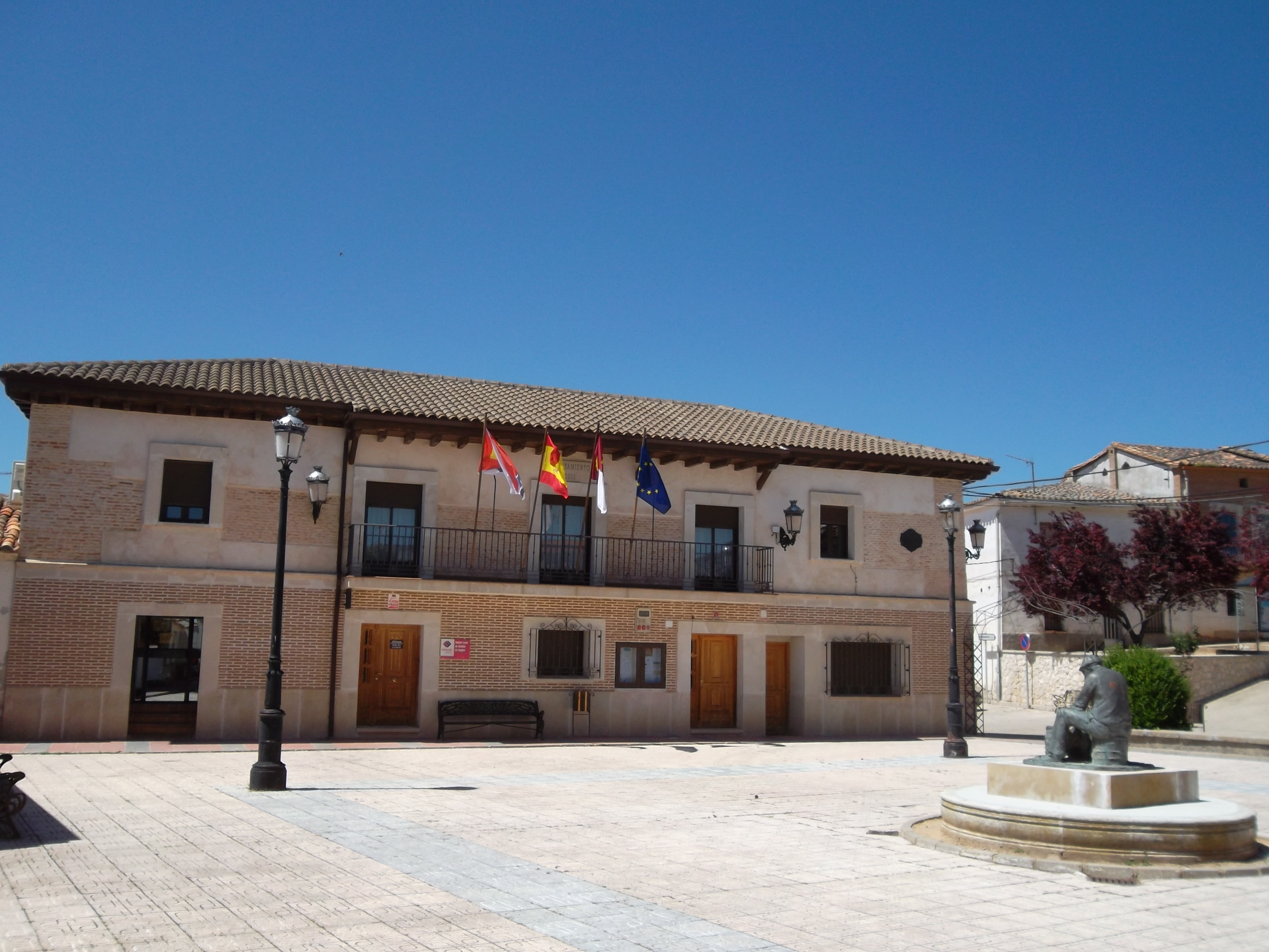 Tórtola de Henares - La plaza de España, el monumento al "Espartero" y el edificio del Ayuntamiento.